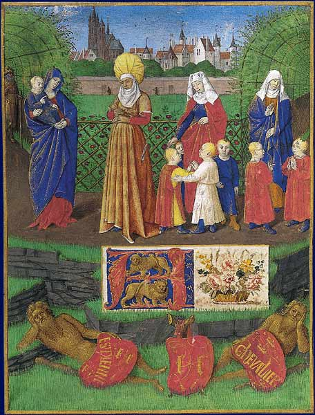 Sainte Anne et les trois Marie Heures d'Étienne Chevalier, enluminées par Jean Fouquet. Paris, BnF, département des Manuscrits, NAL 1416. D'après la Légende dorée, sainte Anne eut trois époux, Joachim, Cléophas et Salomé, avec lesquels elle eut respectivement la Vierge, Marie, épouse d'Alphée, et Marie, épouse de Zébédée. À l'angle d'un jardin urbain, devant un treillis garni de rosiers, sainte Anne se tient parmi ses trois filles accompagnées de leurs enfants. La Vierge, portant Jésus dans ses bras, se détache sur la perspective verdoyante d'une tonnelle, où saint Joseph apparaît au fond à gauche.